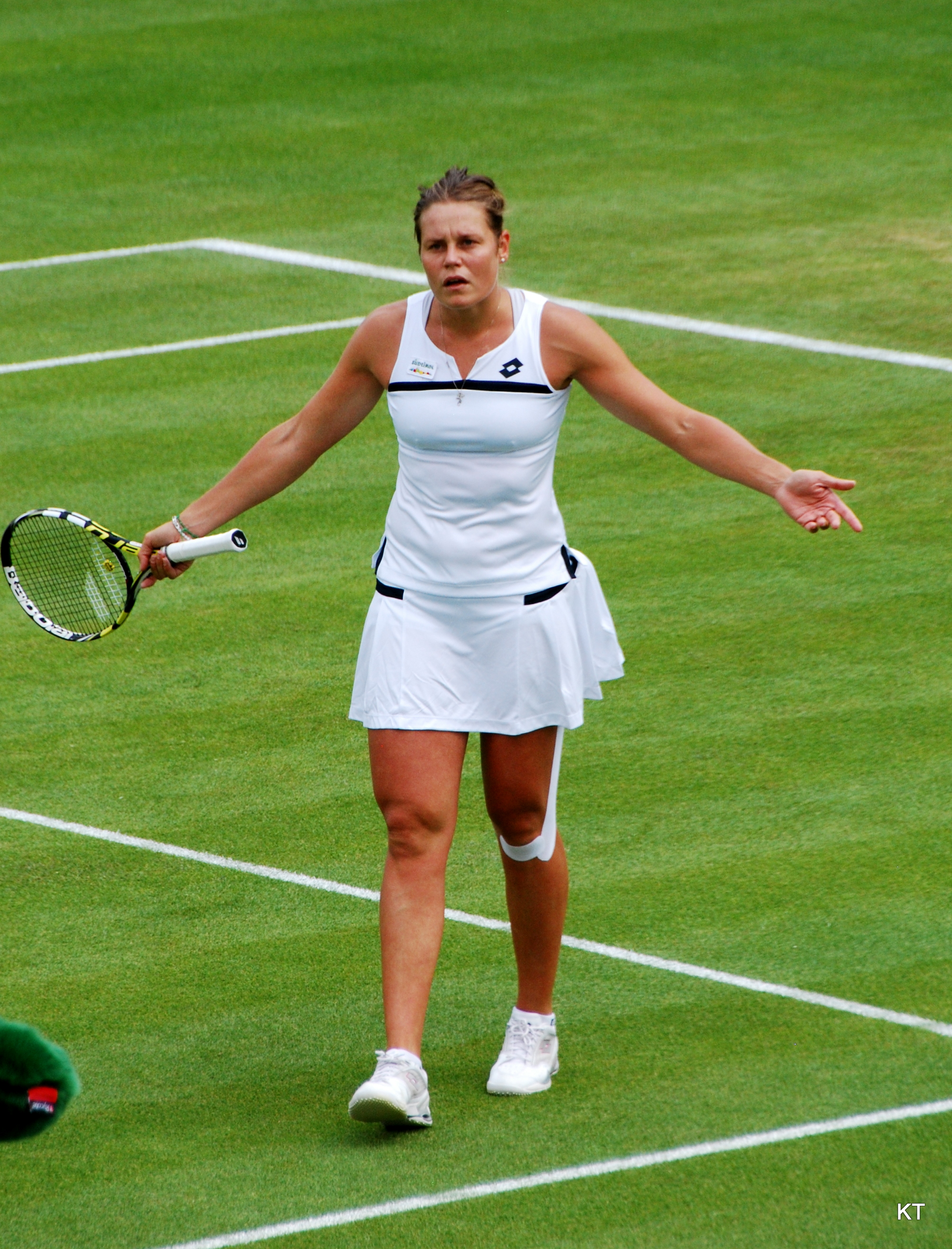 Karin Knapp